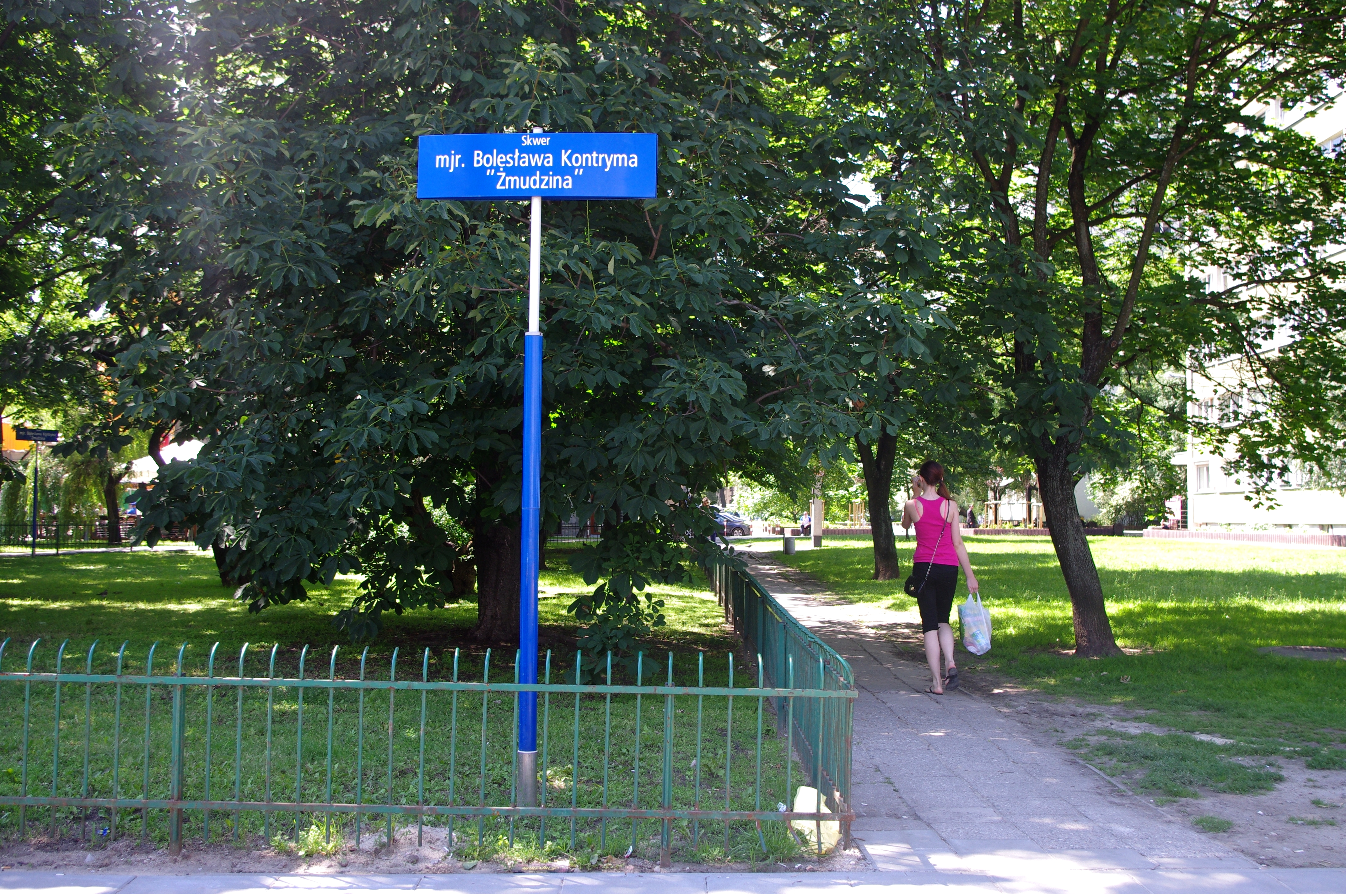 Skwer im. mjr. Bolesława Kontryma ”Żmudzina” w Warszawie, w dzielnicy Śródmieście (stan na 16 czerwca 2012)